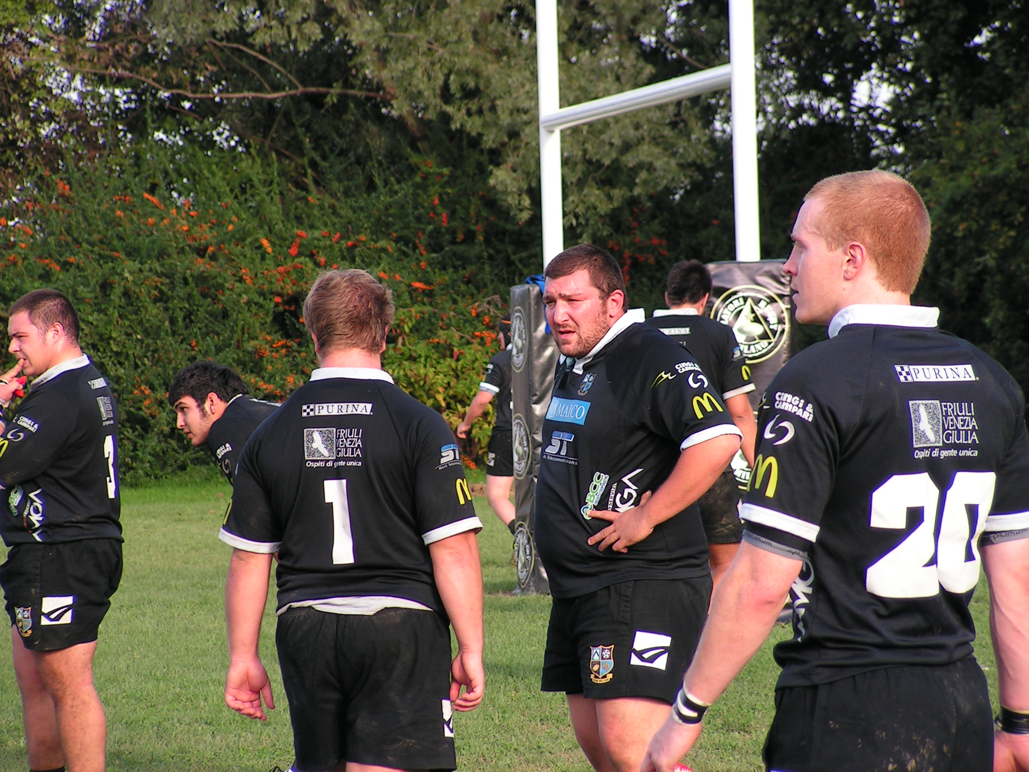 Amatori Milano - Udine RFC Campionato italiano di rugby a 15 - Serie A1 - Seconda giornata Giocatori dell'Udine RFC